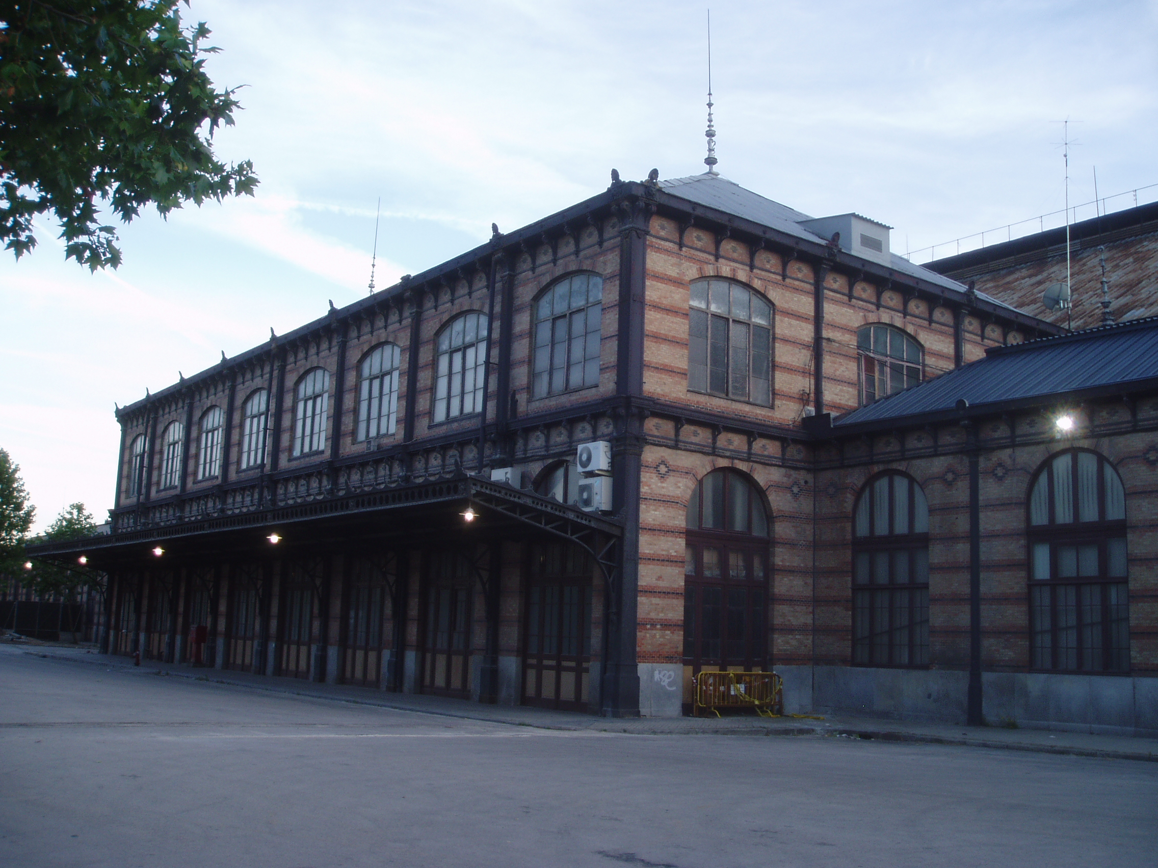 Estación de Delicias (lateral). Madrid. España